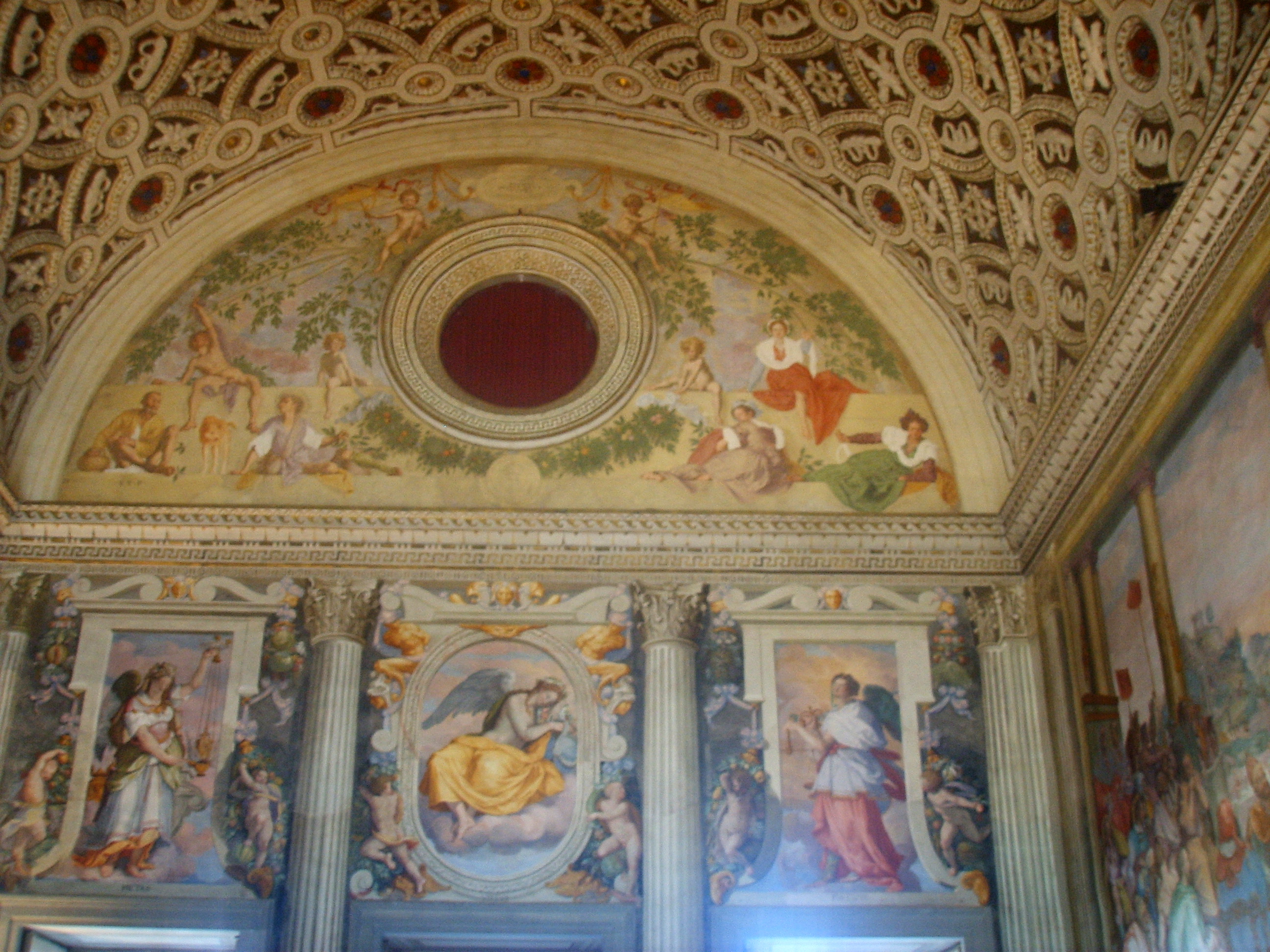 Villa medicea di Poggio a Caiano, inside sala di Leone X Fresco by Alessandro Allori (down) and Pontormo(top lunette) in Poggio a Caiano, Italy